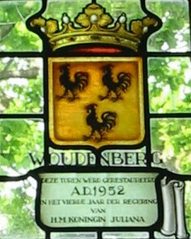 Dit is het wapen van Woudenberg, zoals het te zien is in het raam van de kerktoren van de Woudenbergse (Hervormde) Dorpskerk. Dit glas-in-lood wapen werd in 1952 geplaatst naar aanleiding van de voltooiing van de restauratie van de toren. Een omschrijving van het wapen, en meer over de geschiedenis ervan, vindt u hier.